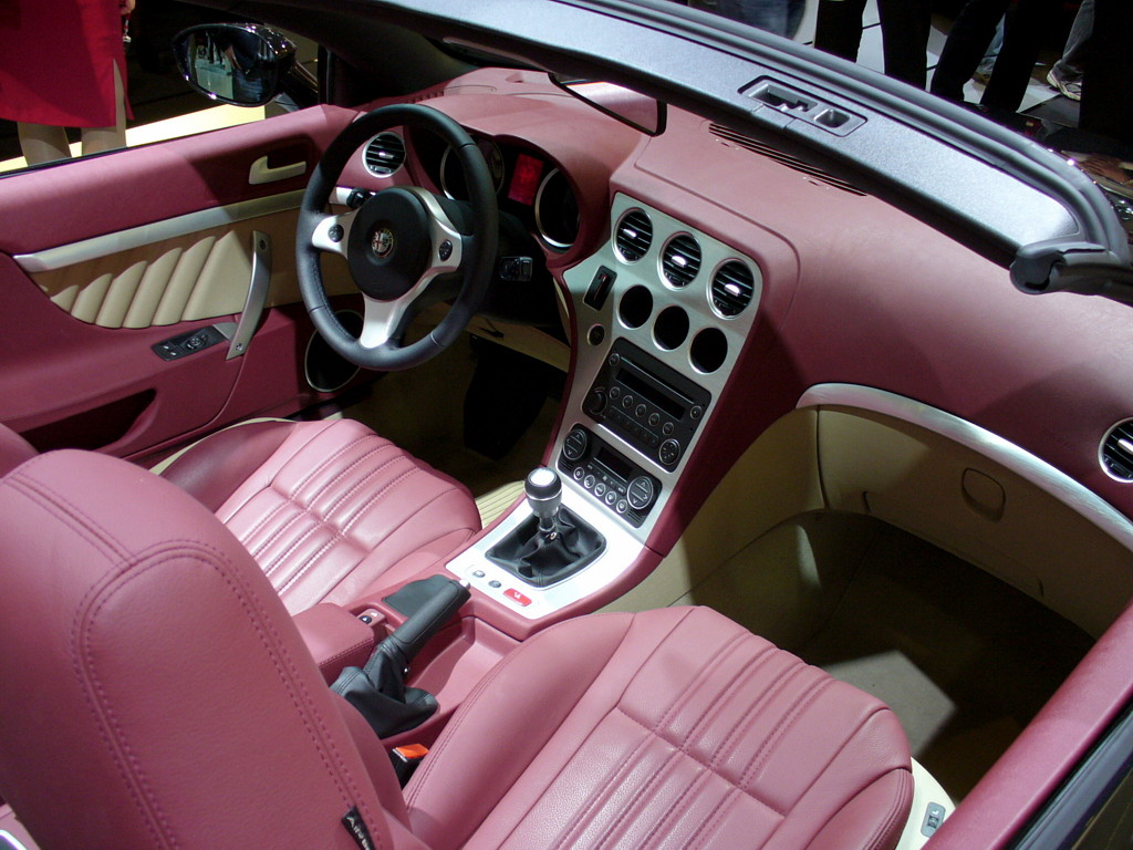 Alfa Romeo Spider Interieur